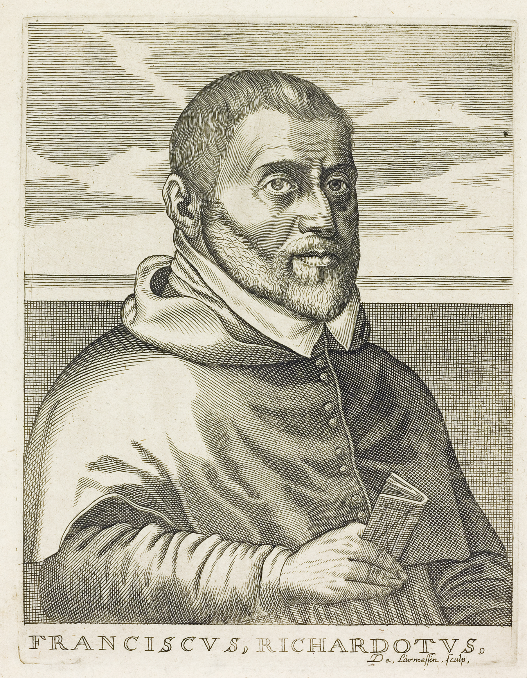 François_Richardot eveque d'arras